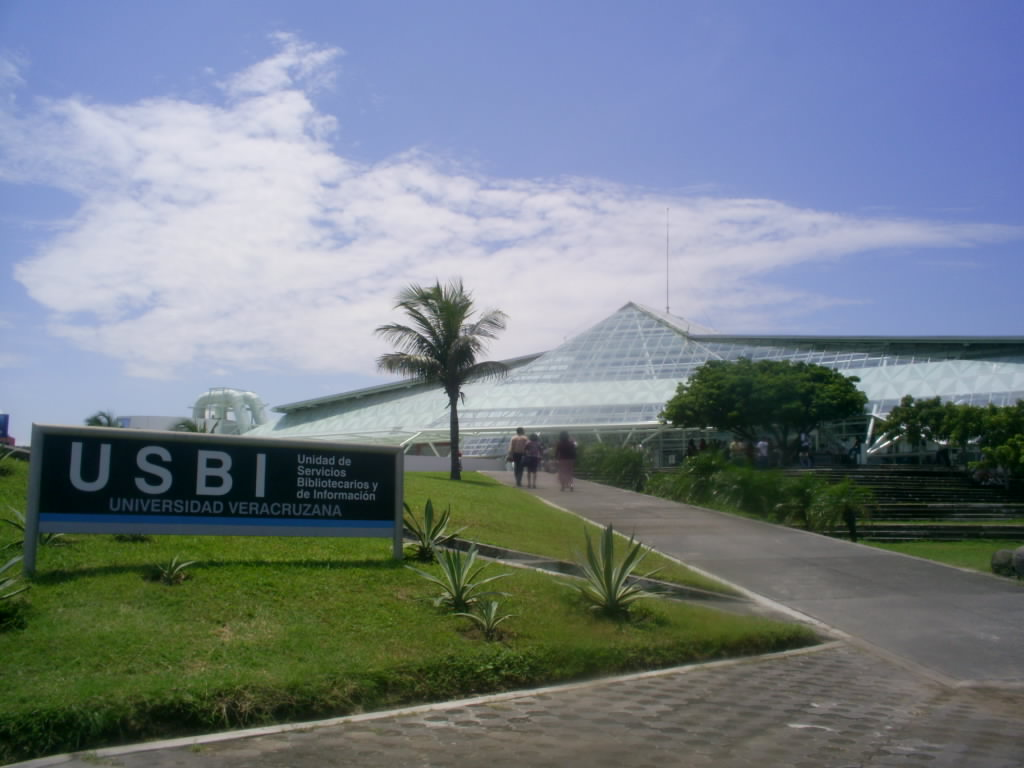 Unidad de Servicios Bibliotecarios y de Informacion Veracruz-Boca del Rio